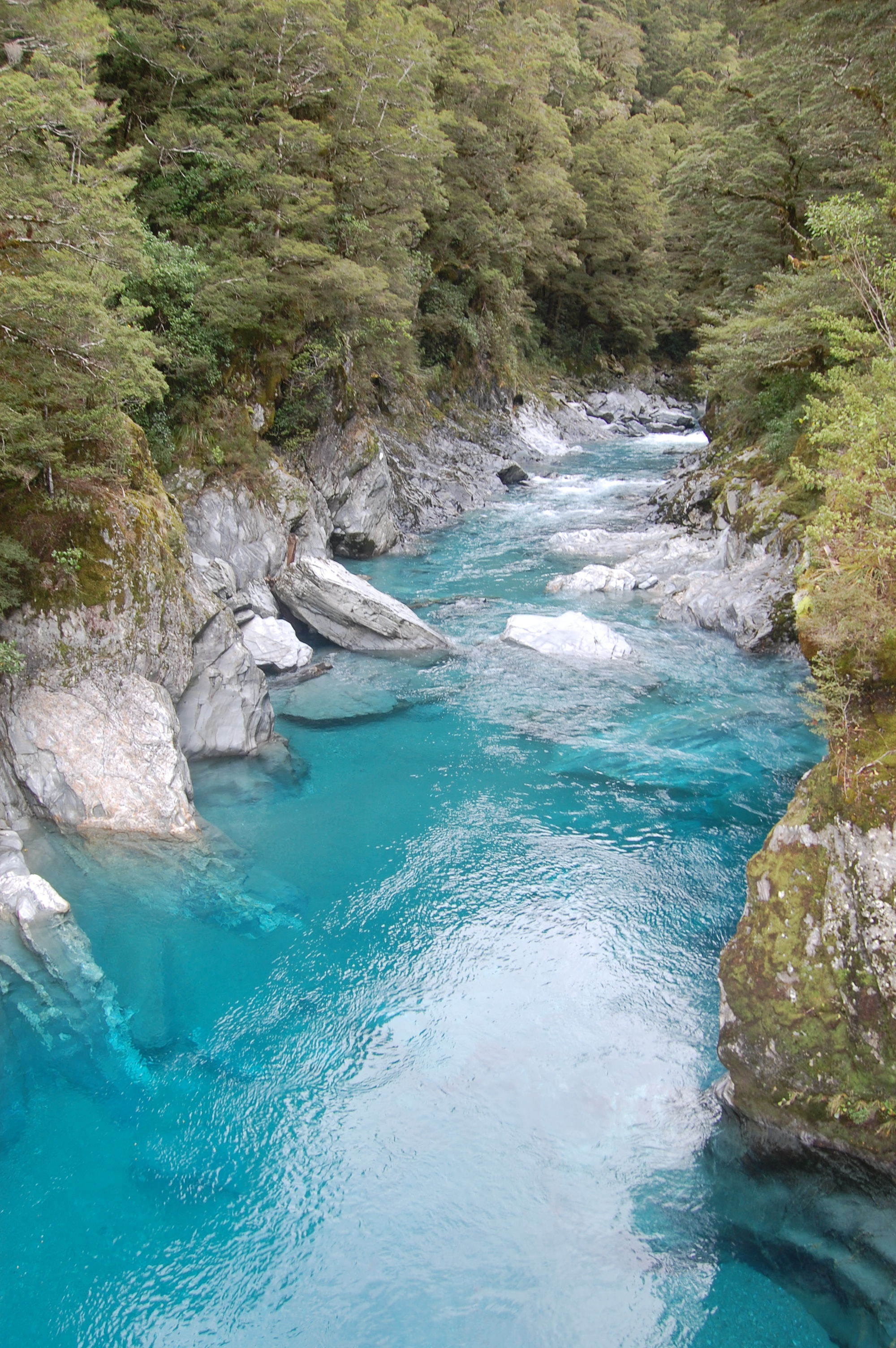 Blue Pools